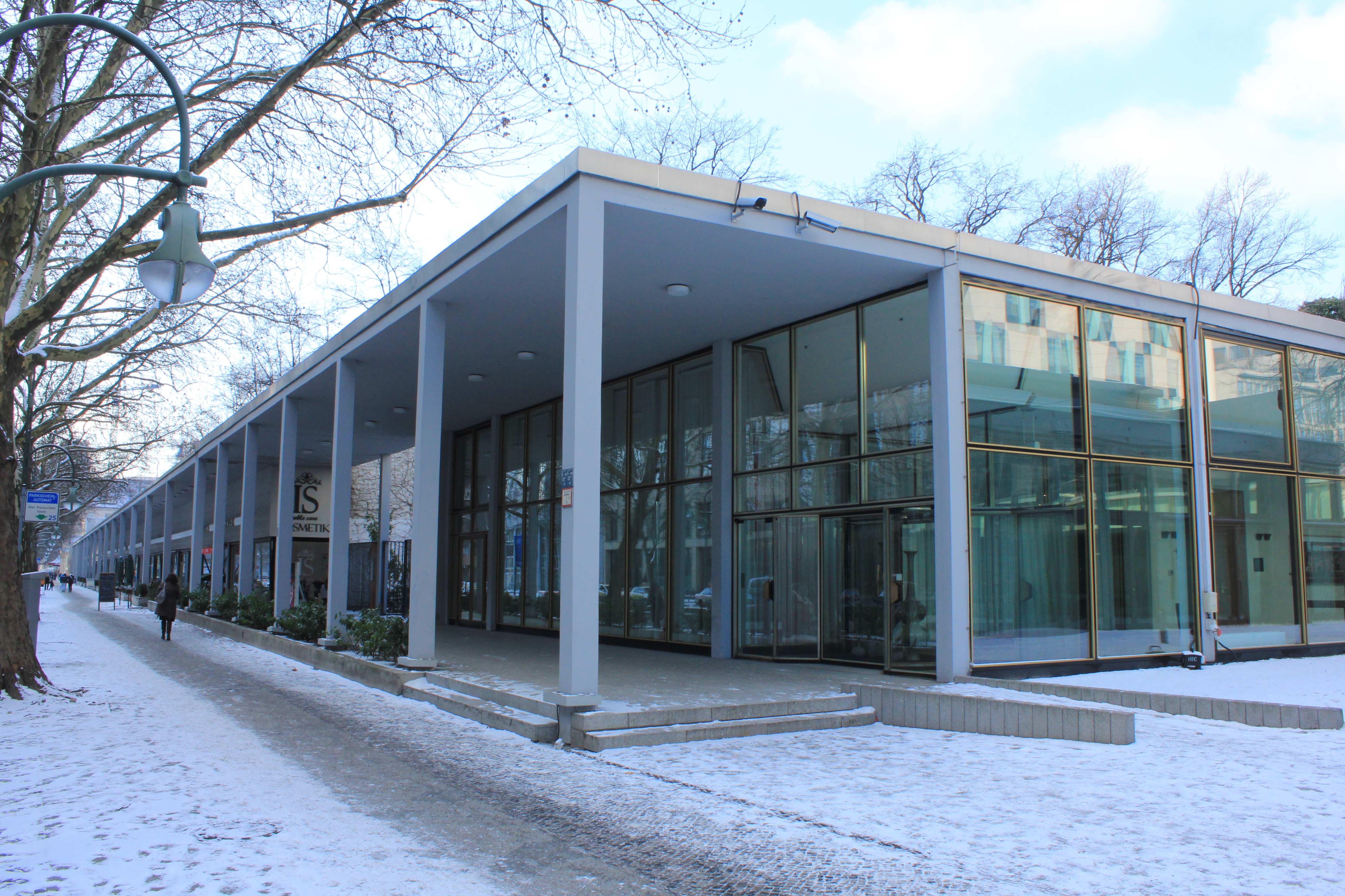 Hilton-Hotel mit Ladenpassage (InterContinental Berlin) 1957-60 von Pereira & Luckman, Schwebes & Schoszberger